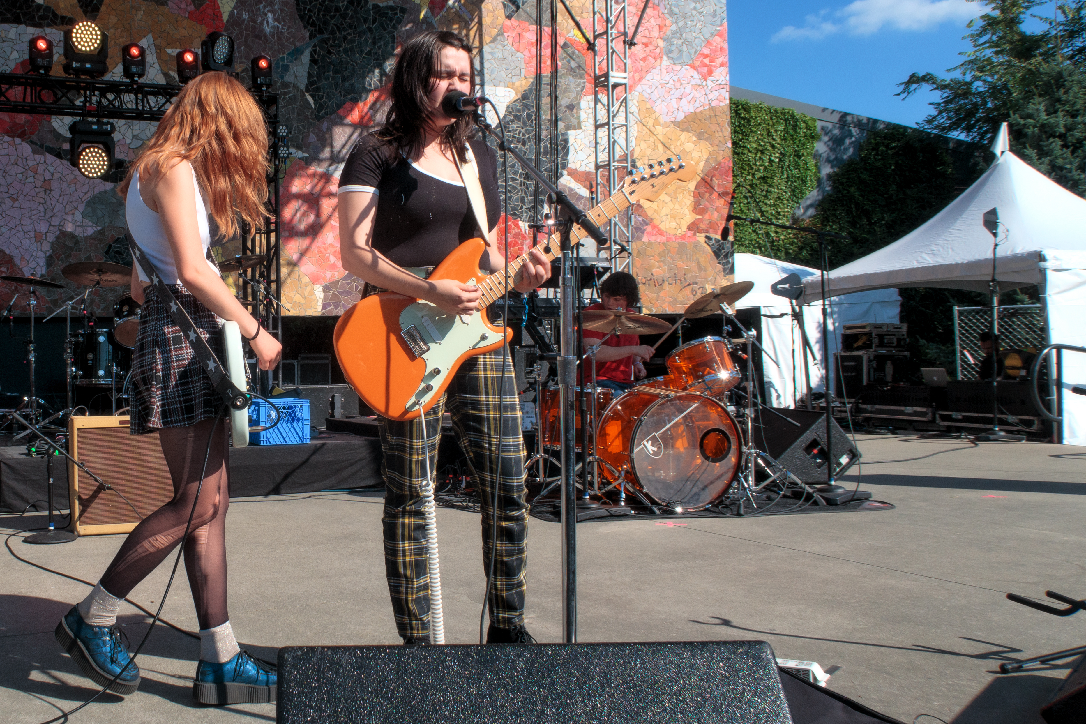 Skating Polly